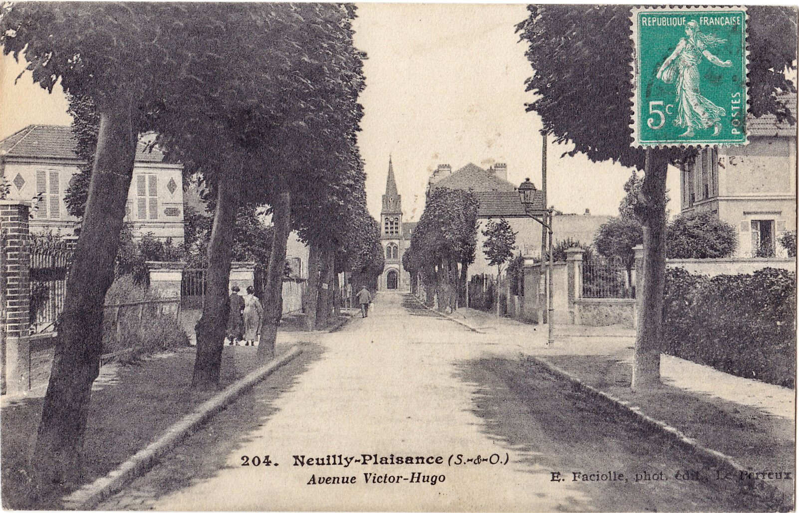 Carte postale ancienne éditée par E. Faciolle au Perreux :NEUILLY-PLAISANCE - Avenue Victor-Hugo